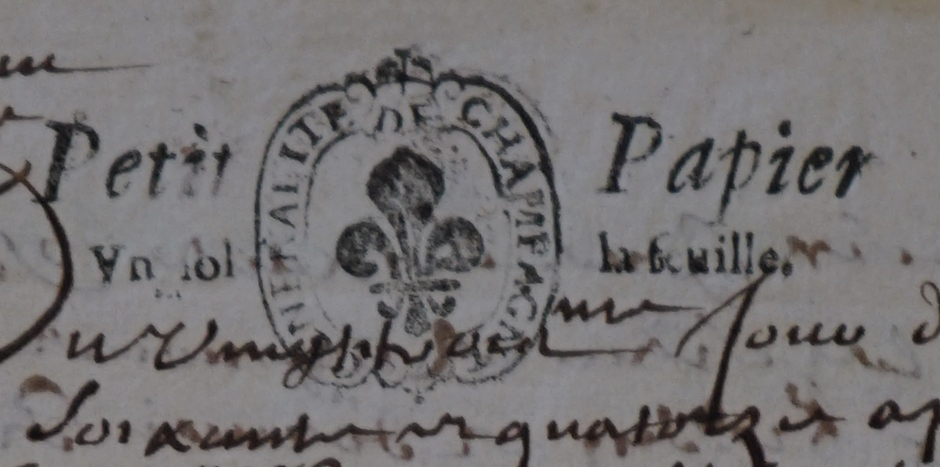 timbre de papier timbré de la Généralité de Chaalons. détail du manuscrit.